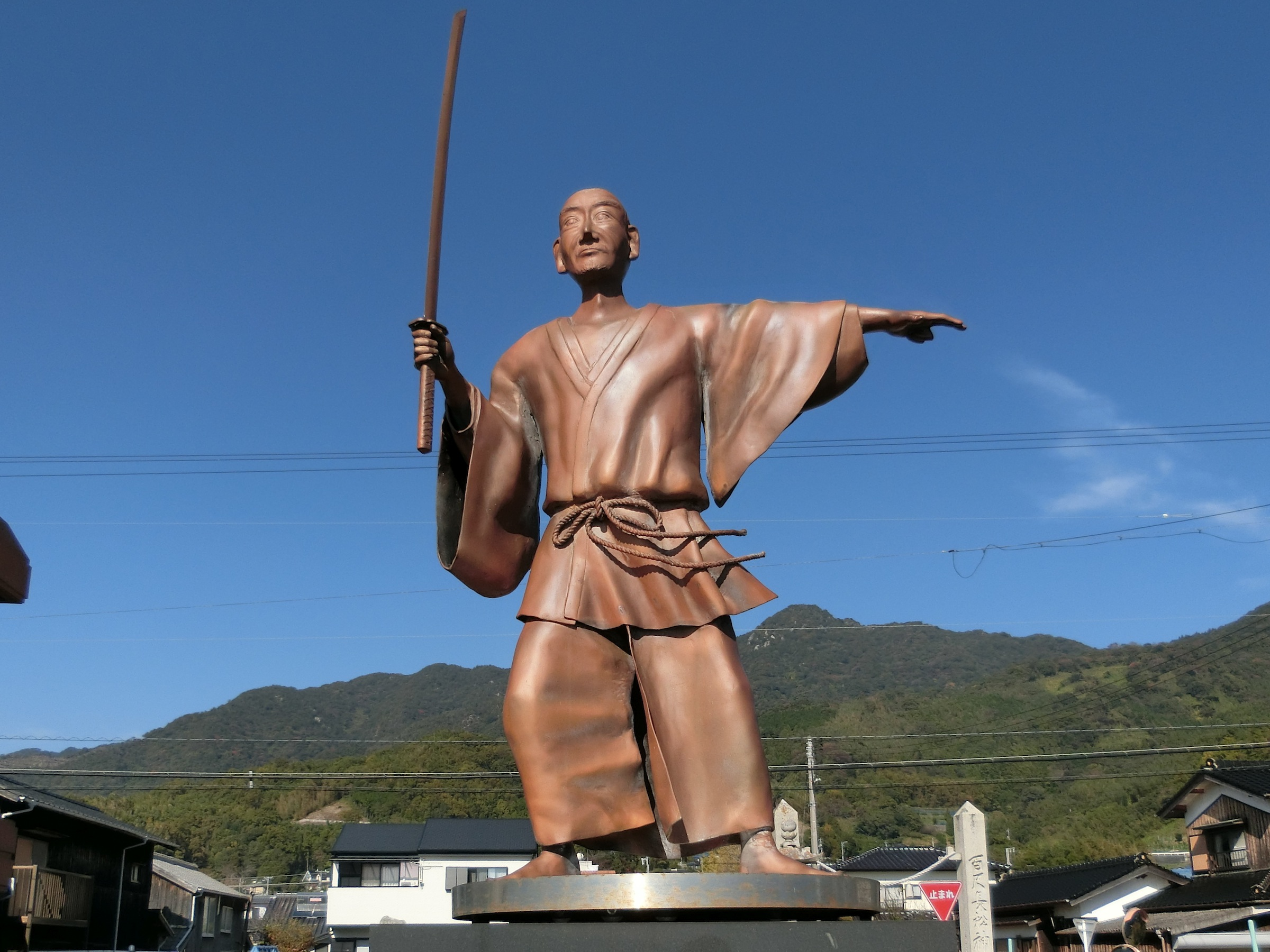 周防国大島郡出身の僧・月性の像（柳井市）。